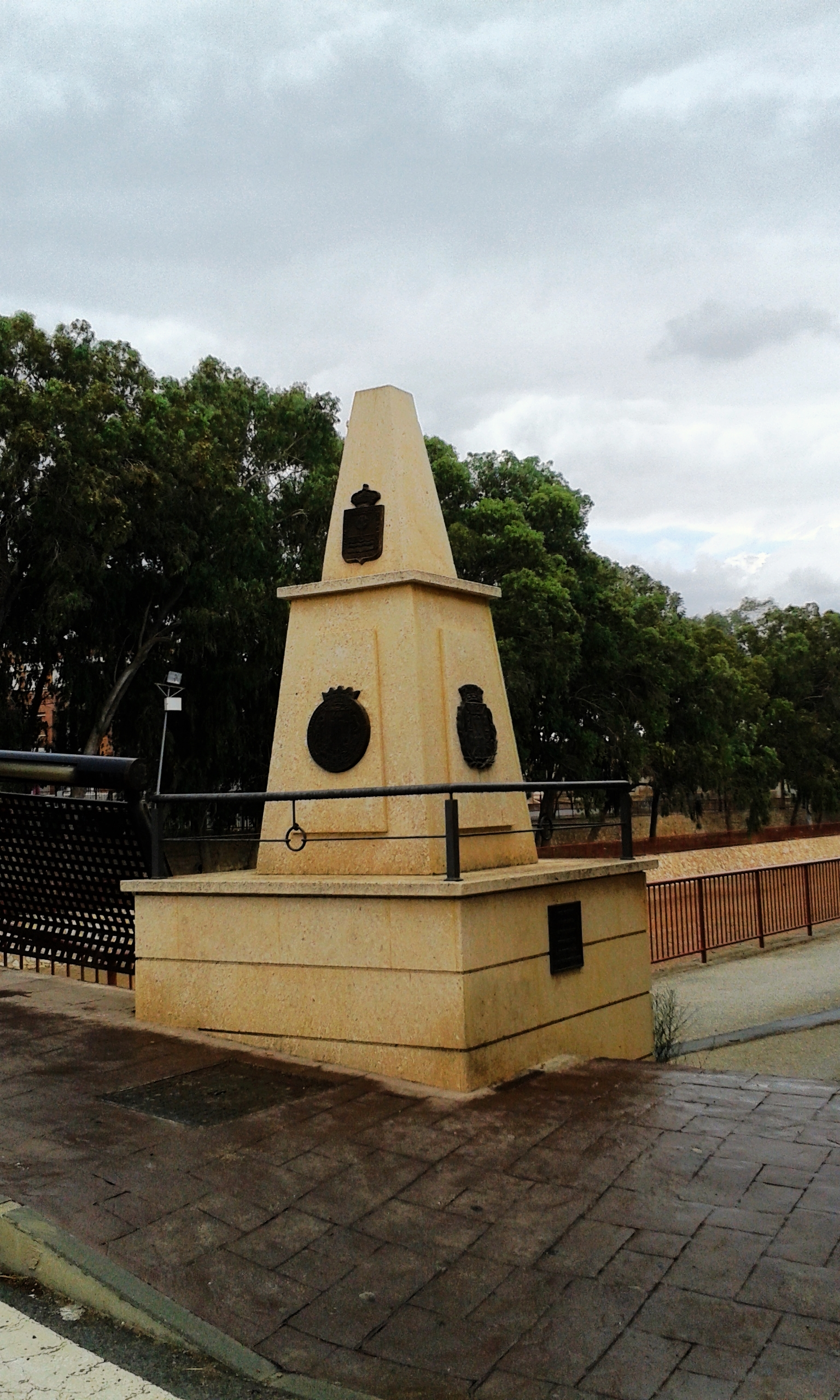 Mojón conmemorativo